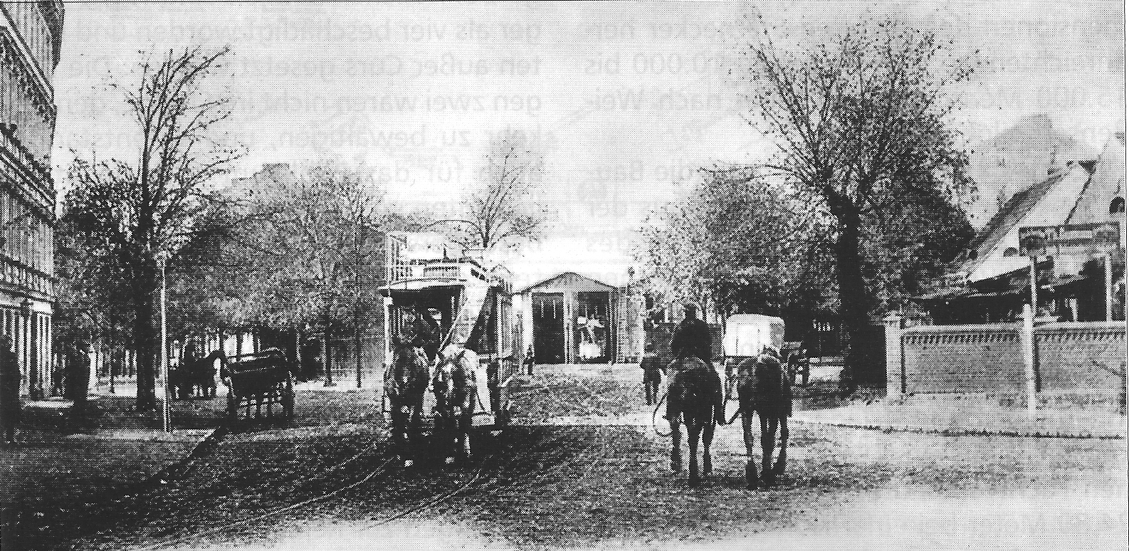 Der Pferdebahnhof Weißensee der Neuen Berliner Pferdebahn